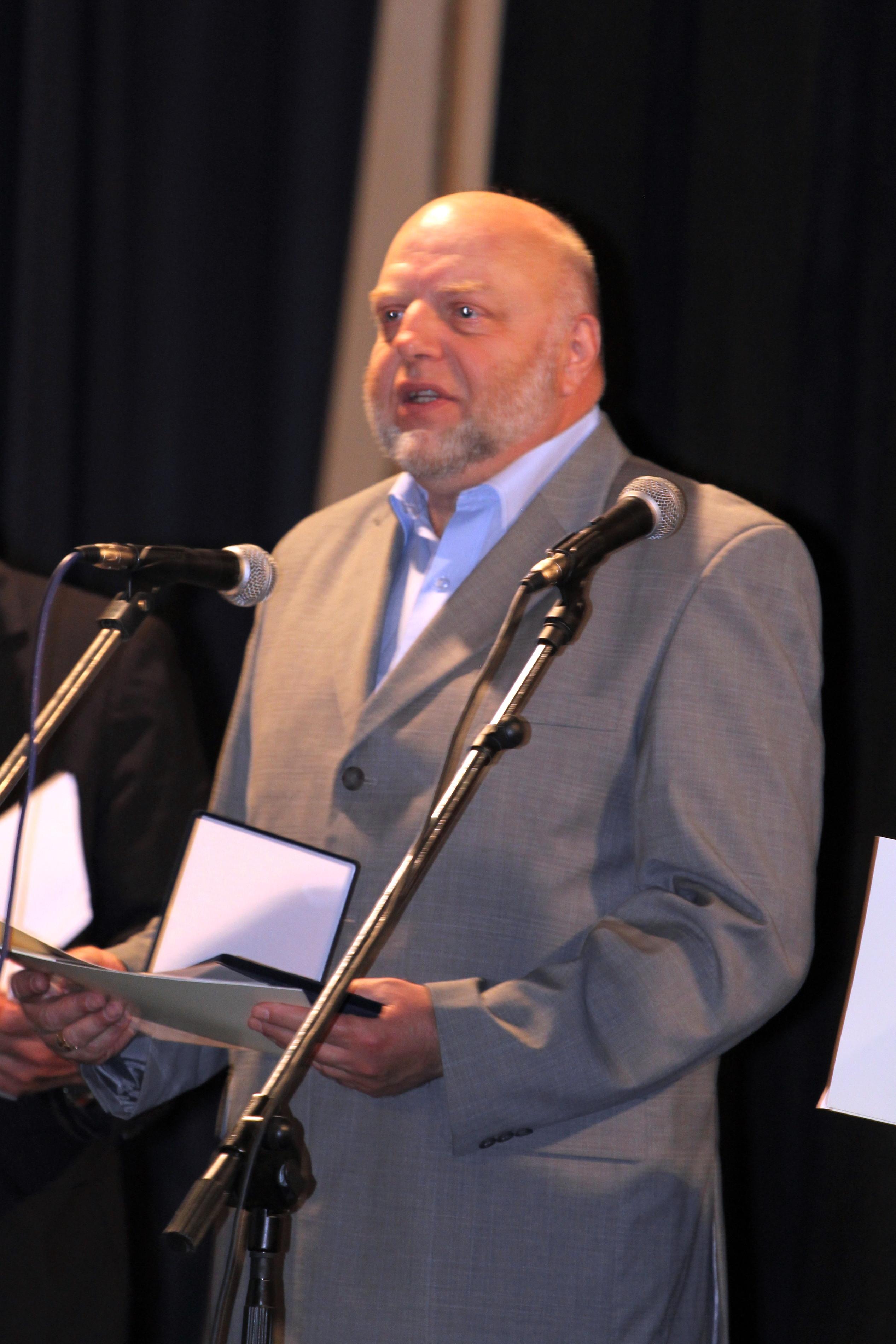 Светолик Милчич е български инженер, историк и писател, автор на книги с историческа насоченост.